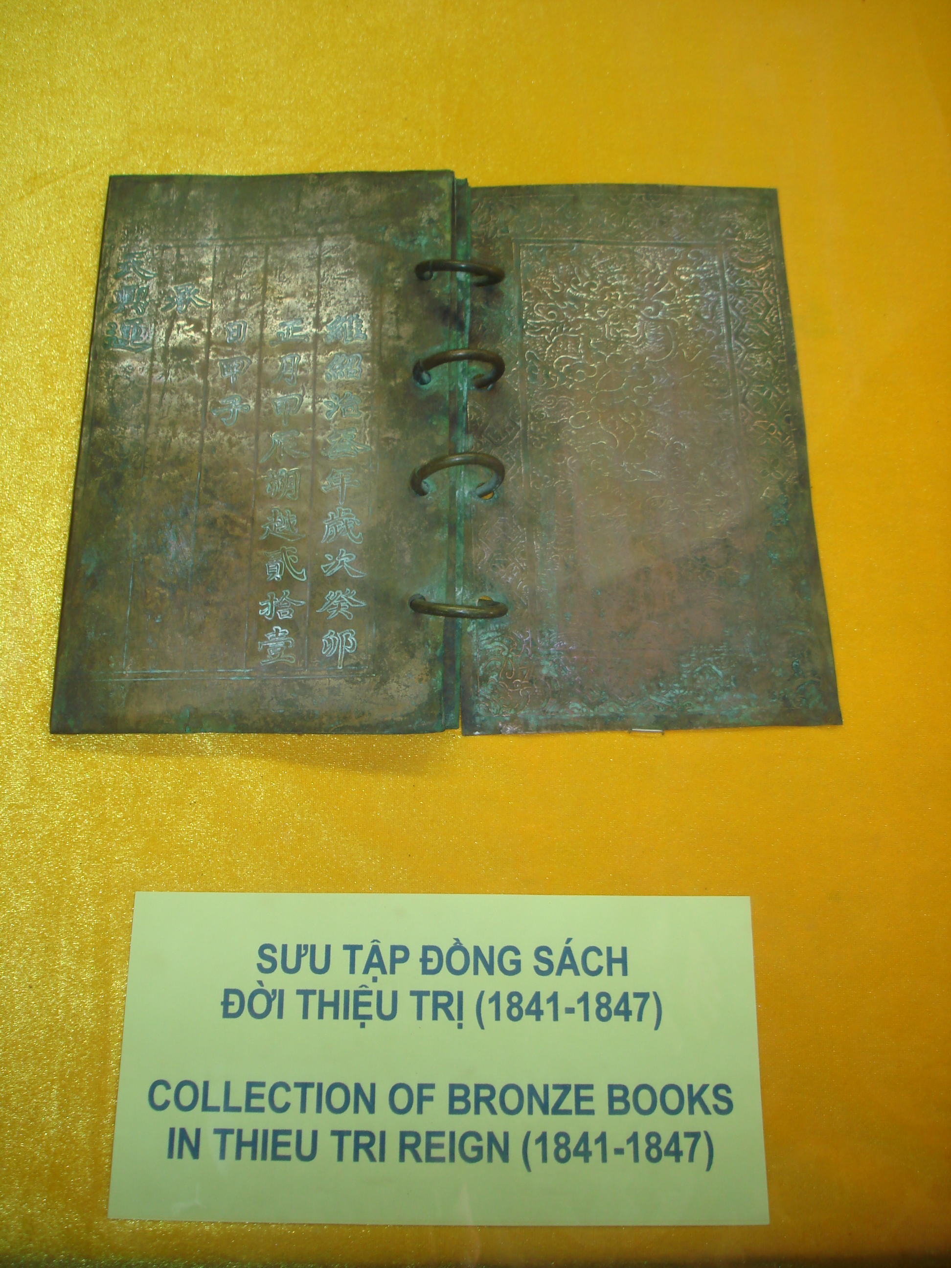 Sưu tập đồng sách thời Thiệu Trị.